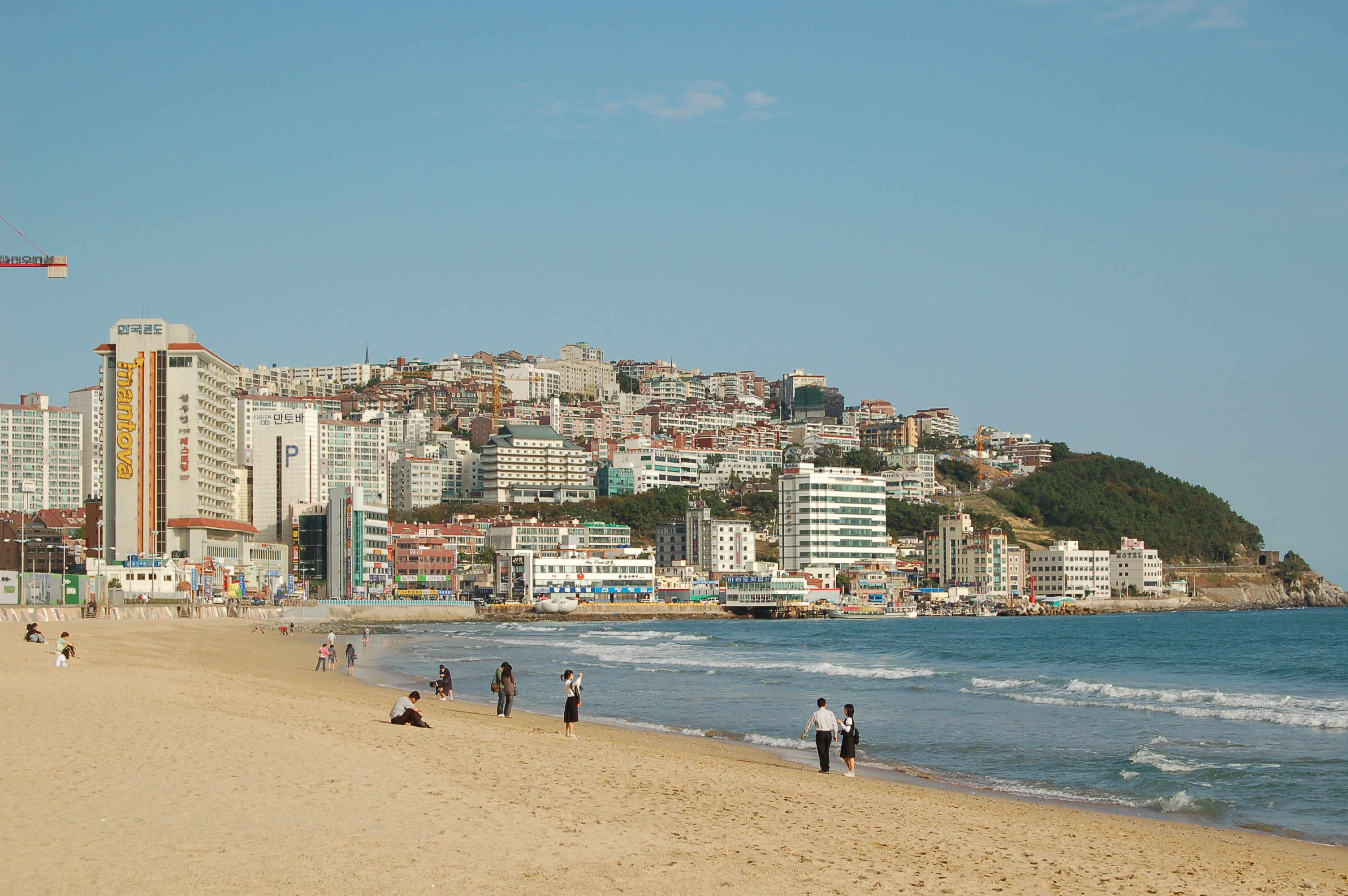 Haeundae, Busan